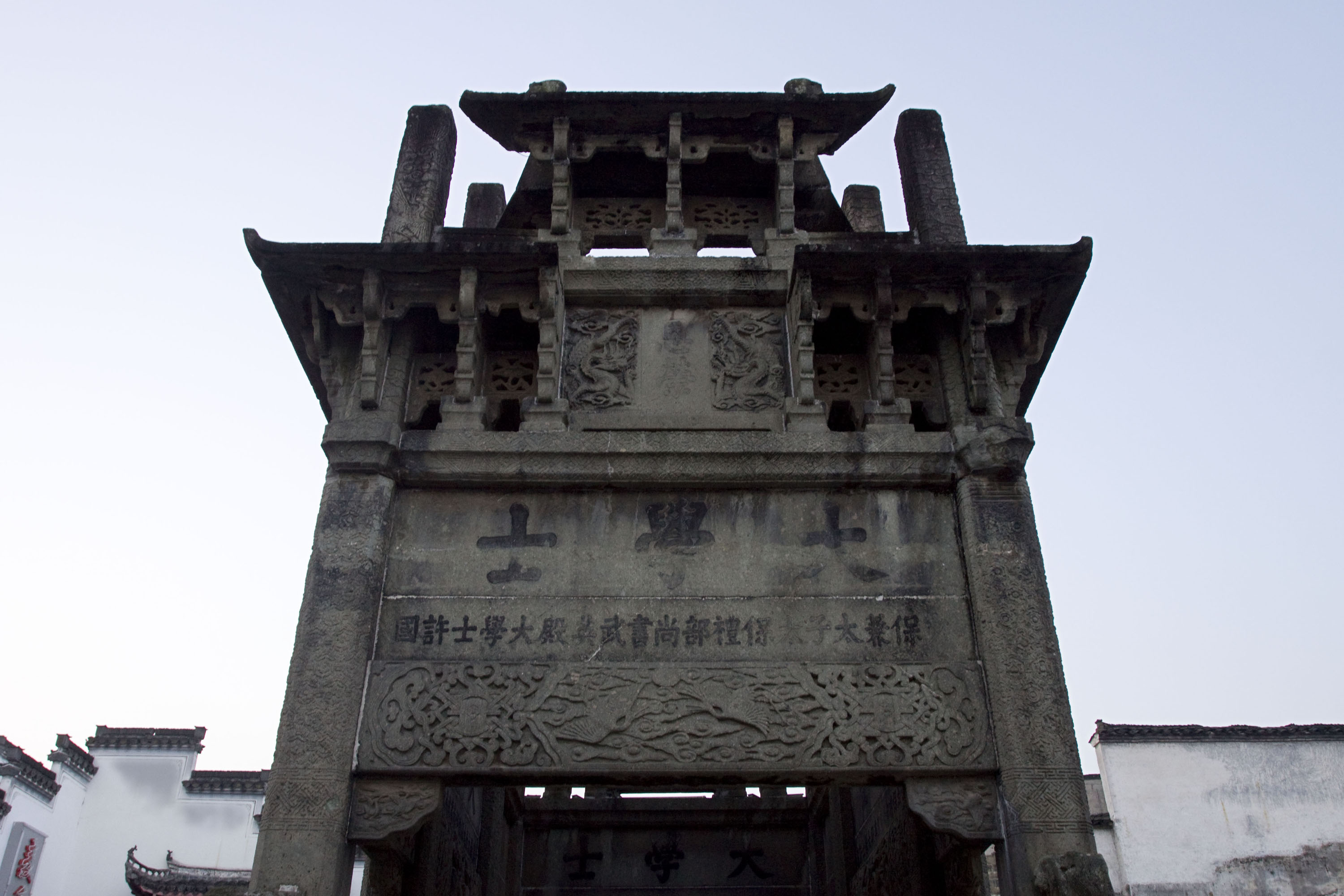 许国石坊，全国重点文物保护单位，位于安徽省歙县。